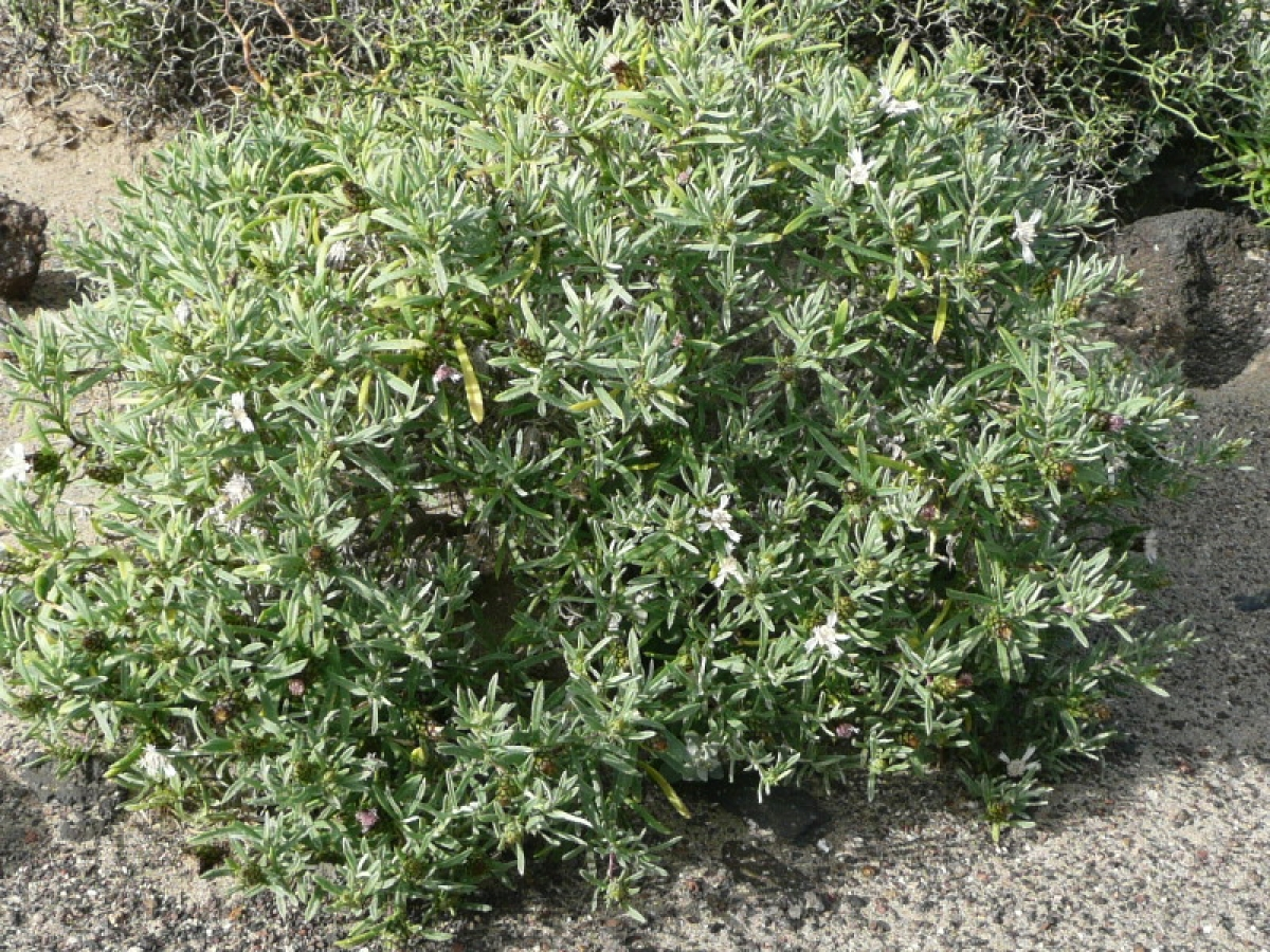 Atractylis preauxiana - Aspecto general - Lanzarote, Islas Canarias (España).